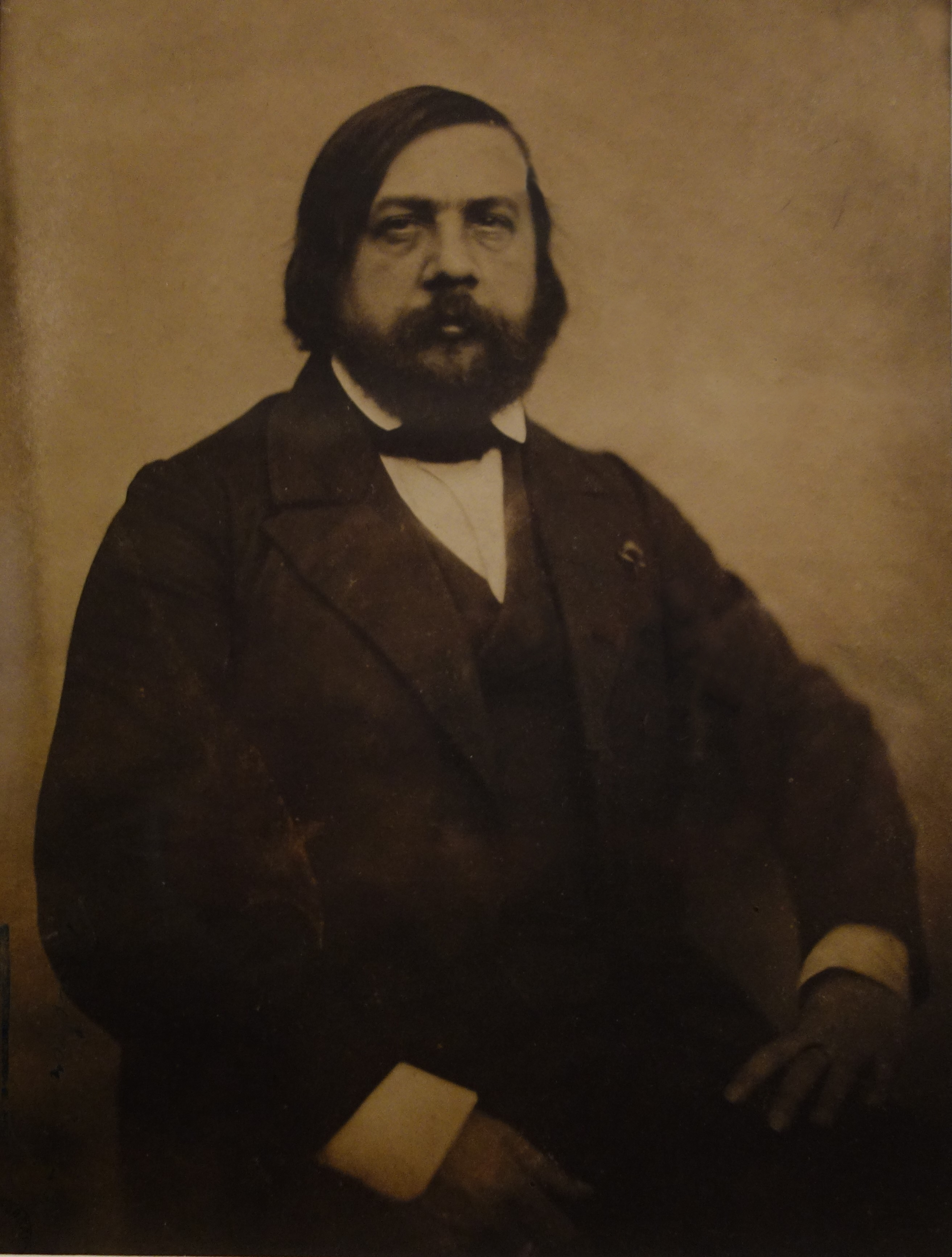 Photographie de Théophile Gautier par Nadar vers 1855. Paris, musée d'Orsay